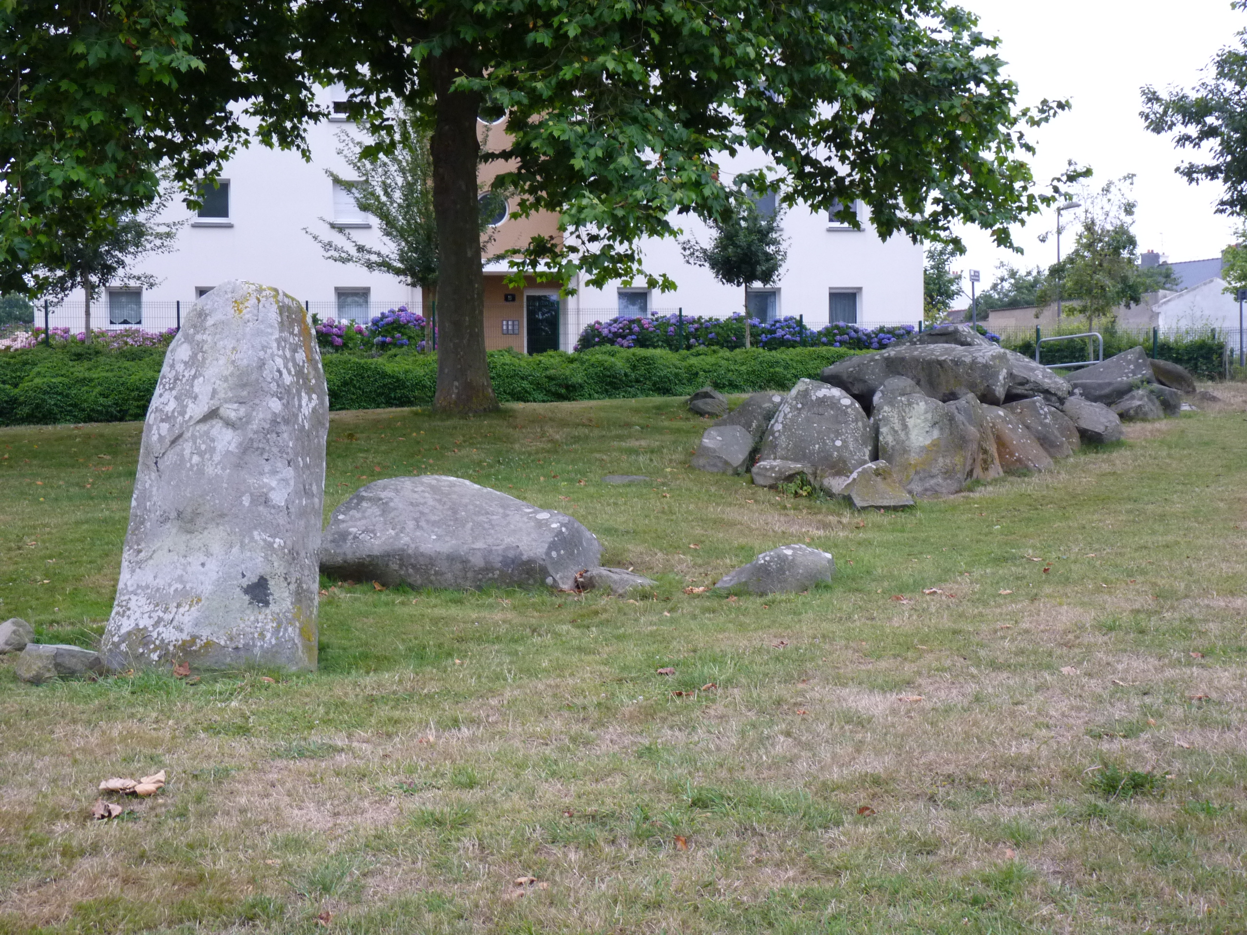 Allée couverte située dans un jardin public en centre-ville.